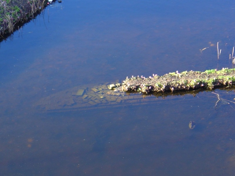 Dit is een van de restanten van de burchtmuur van kasteel Paddenpoel te Leiden. Gemaakt door Rob Honig, die vrijwillig afstand doet van alle rechten.